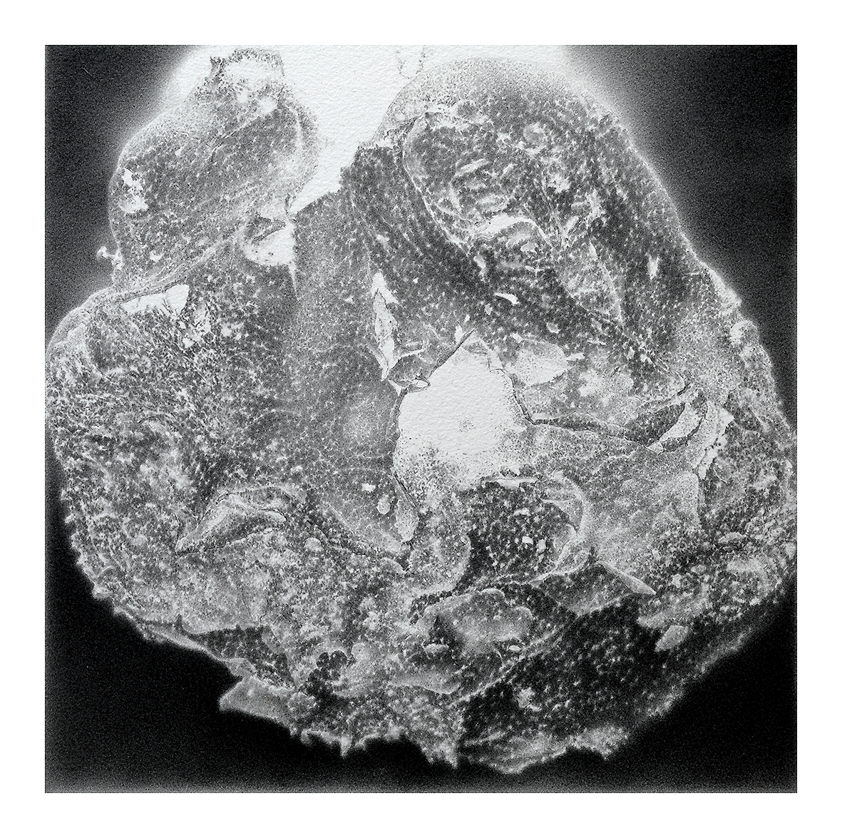 Darstellung eines zerfallenden Bovisten, Graphit-Zeichnung, 23 cm x 23,2 cm, Der Titel bezieht sich auf die Tatsache, dass die Oberflächentextur der eines Kometen ähnlich ist.